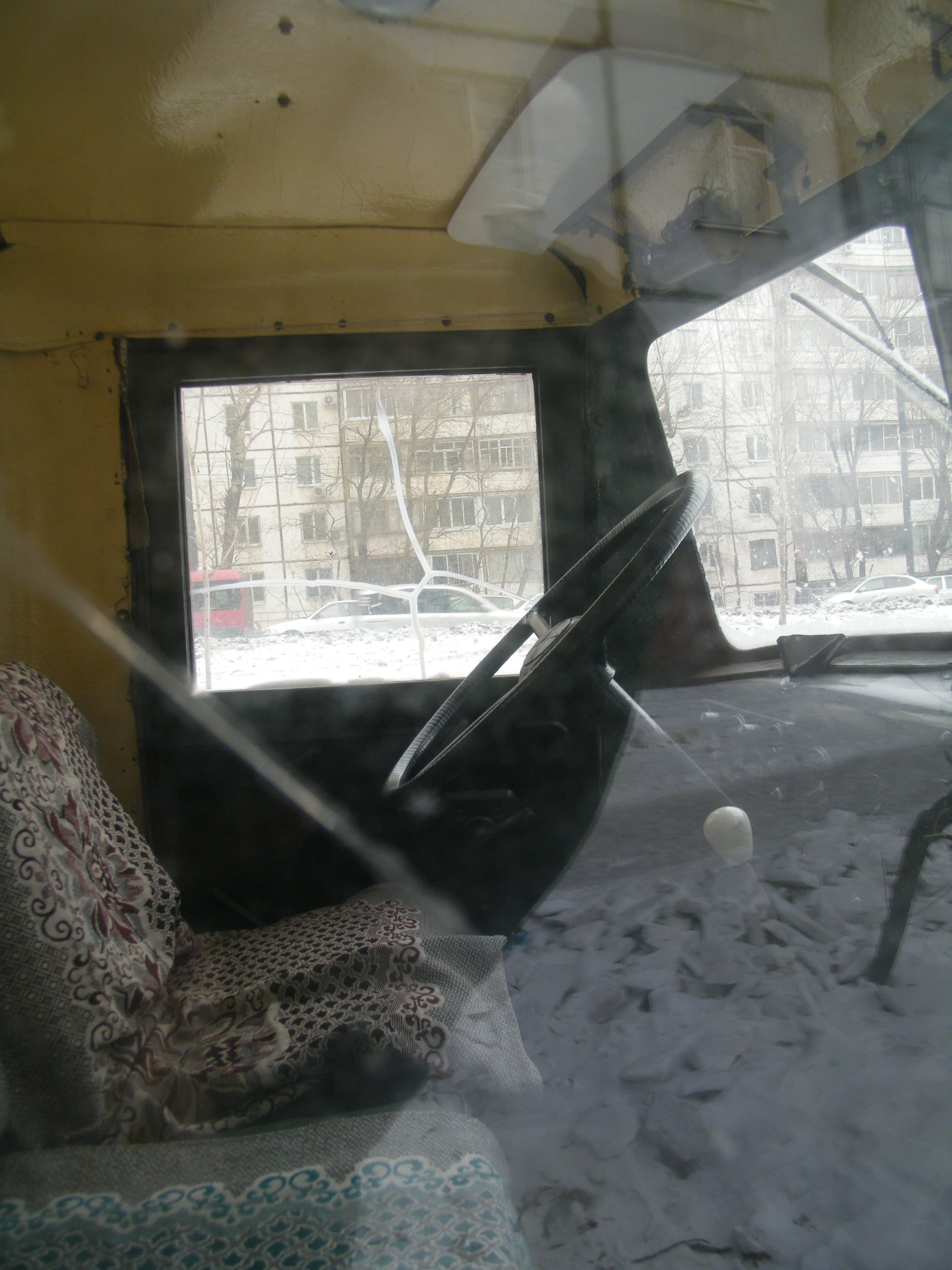 MAZ-200